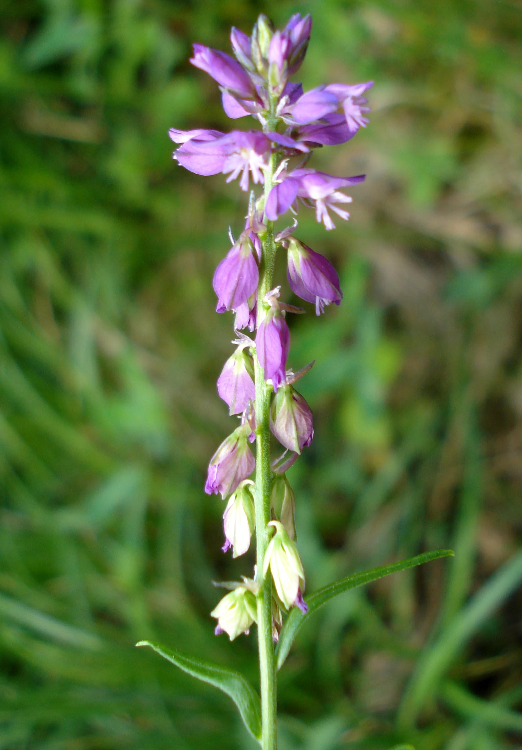 Polygala amarella (Unterfranken, Germany)